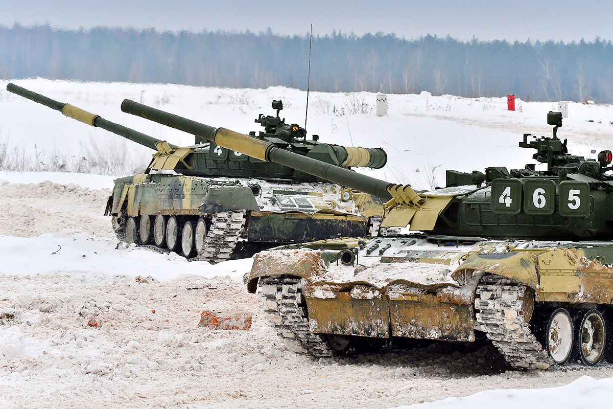 Полевые занятия танкистов 4-й гвардейской Кантемировской танковой дивизии.